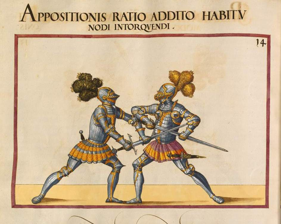 Escena de lucha entre caballeros